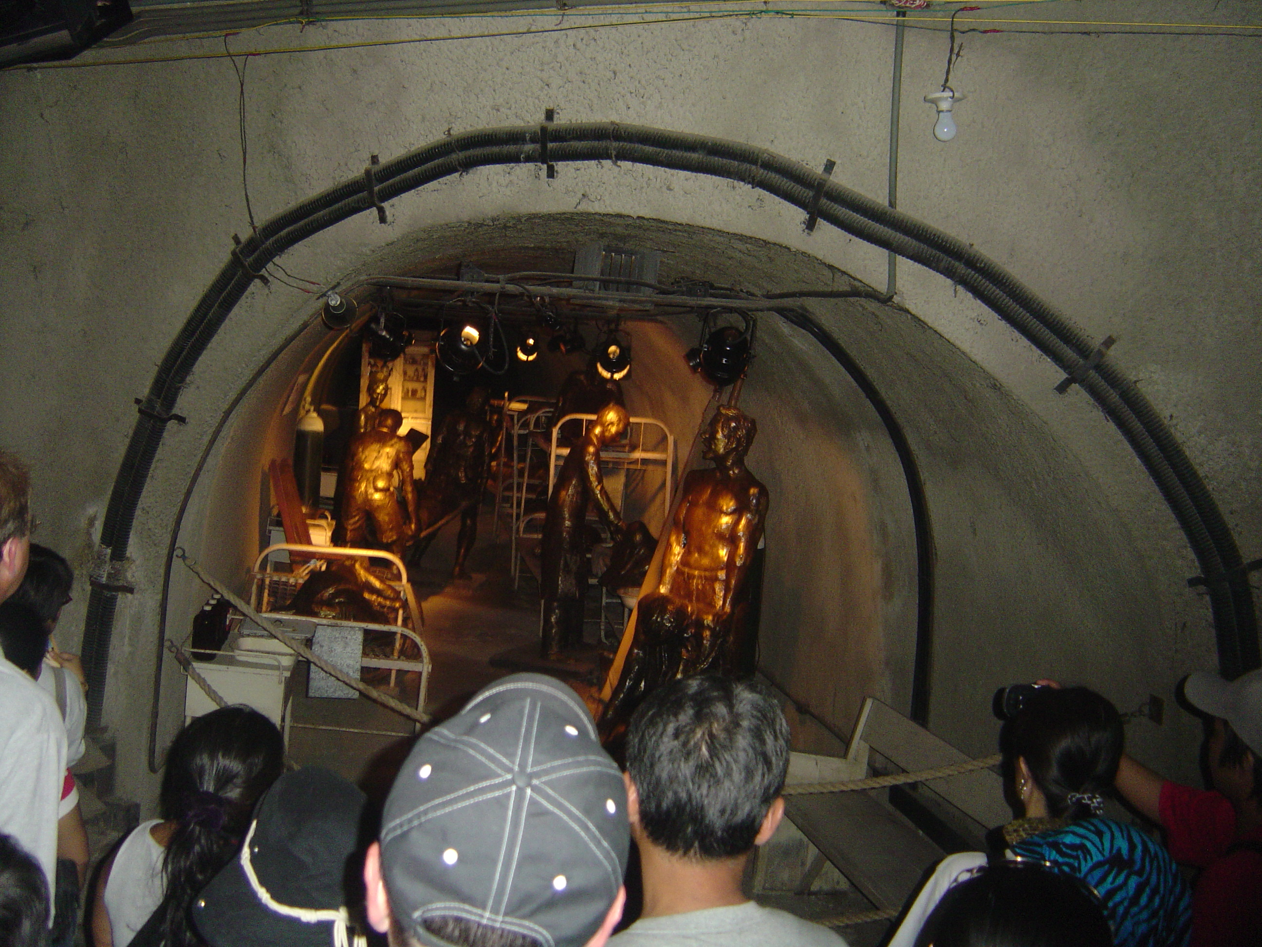 コレヒドール島マリンタ・トンネル展示室。